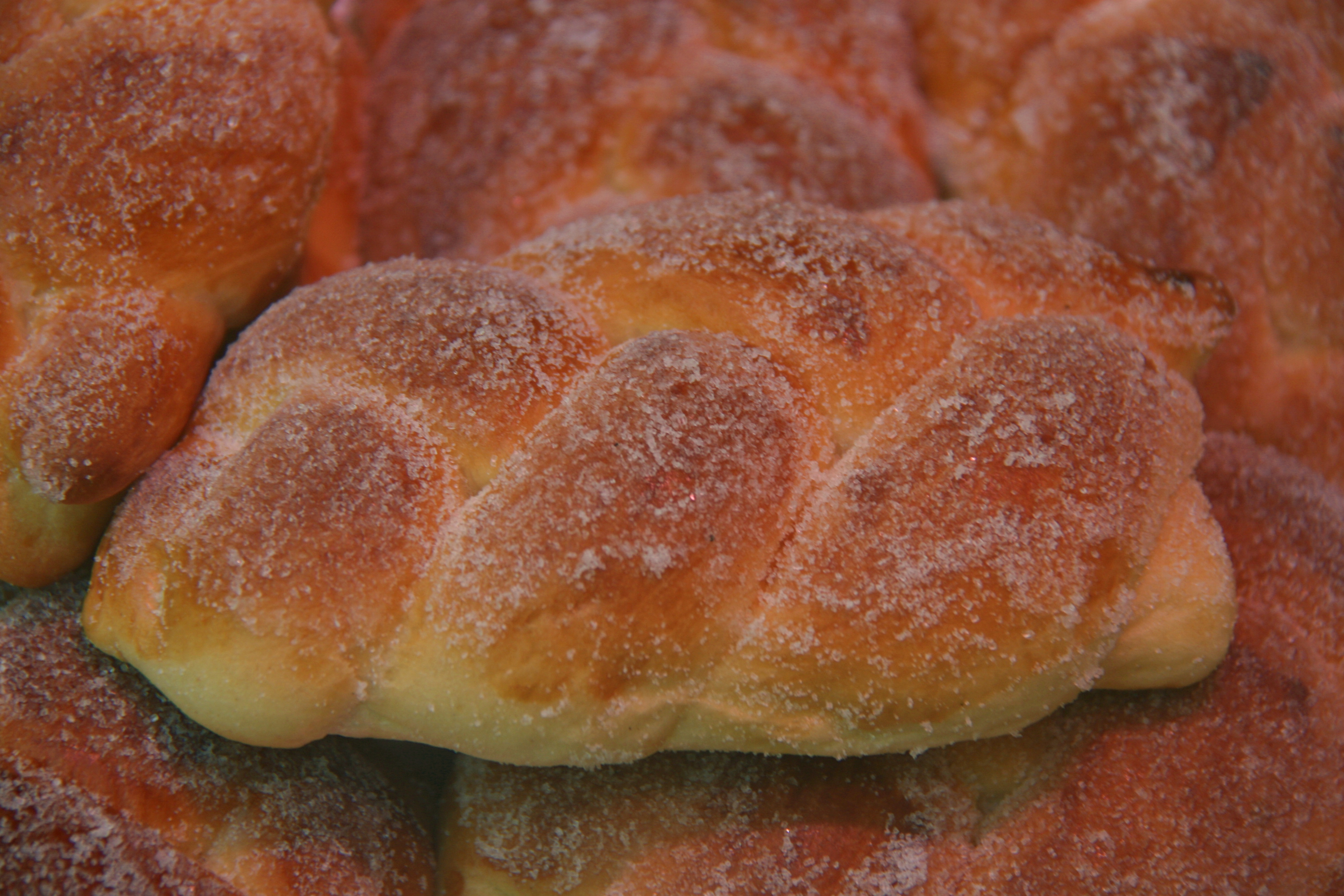 trenza - La Rosita (MAdrid)